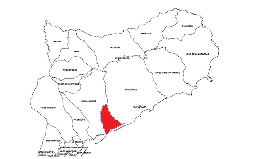 Localización de Cueva Bermeja